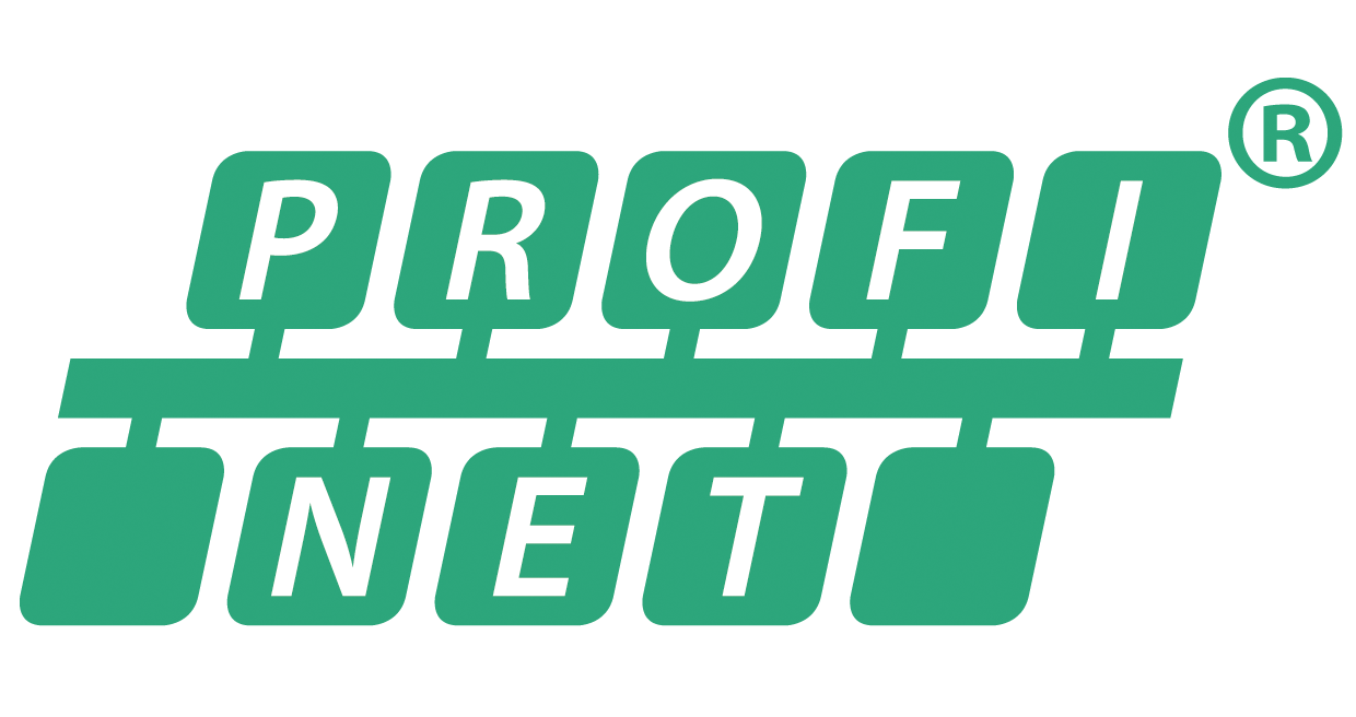 Logo "Profinet" (Version ab 2010)